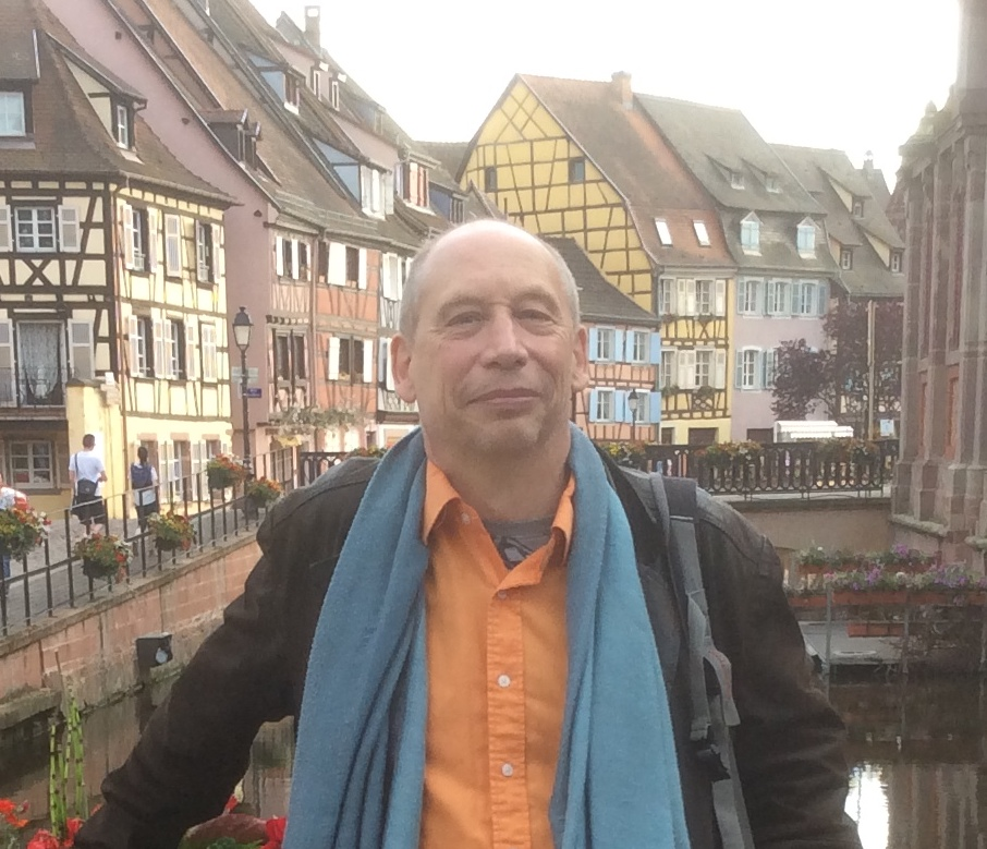 Portrait de Philippe Cornu